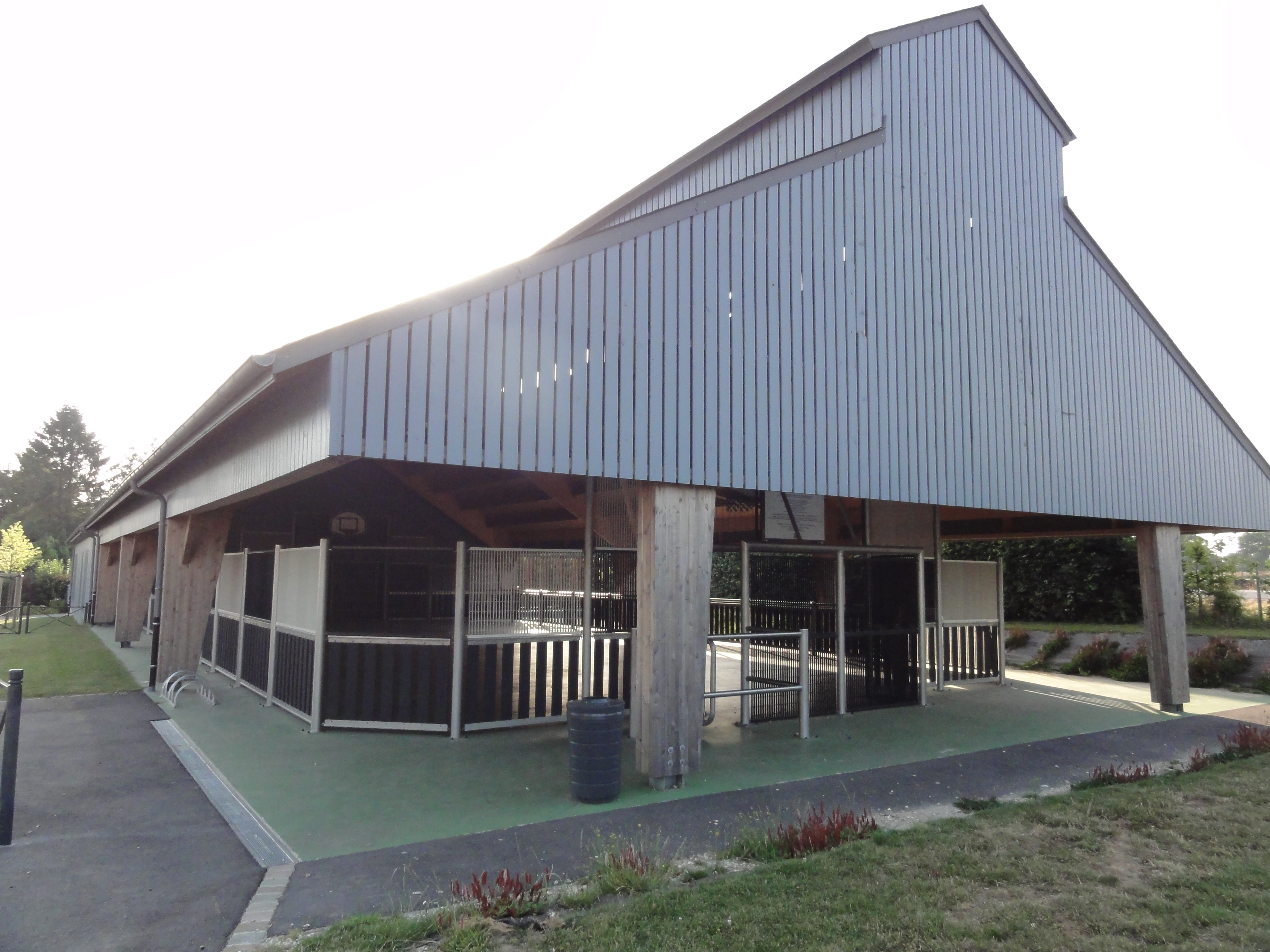 Alvimare (Seine-Mar.) espace multisports (halle et salle)